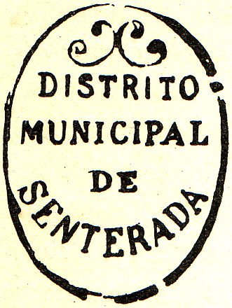 Segell escanejat per l'autor de material d'arxiu de més de 100 anys d'antiguitat.